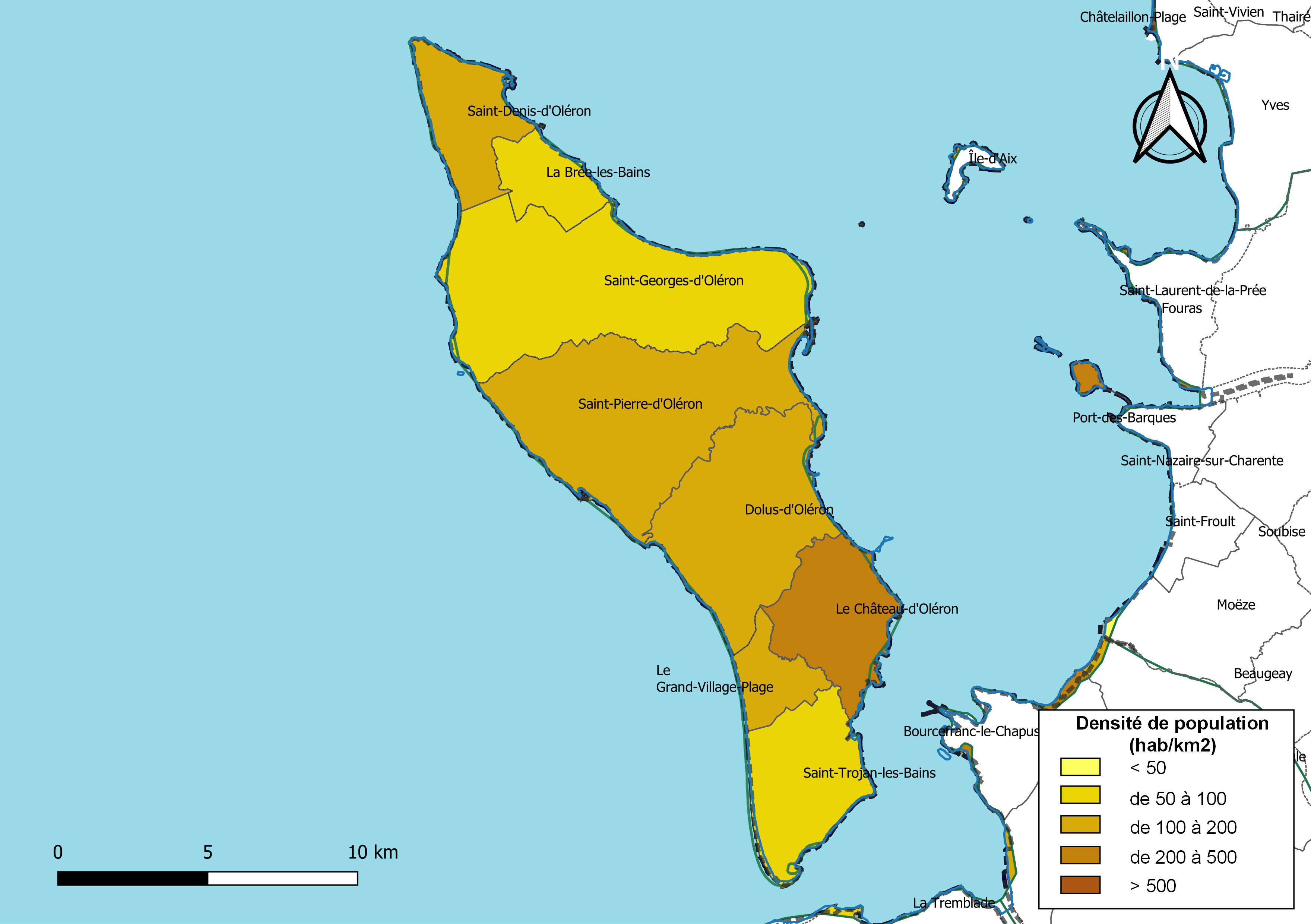 Carte des densités de population (millésimée 2016) des communes de la communauté de communes la Communauté de communes de l'Île-d'Oléron, département de la Charente-Maritime, France. Composition au 1er janvier 2019.